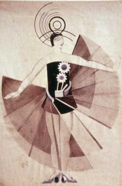 Эскиз костюма к "Аэлите". Коллекция Н.Д. Лобанова-Ростовского